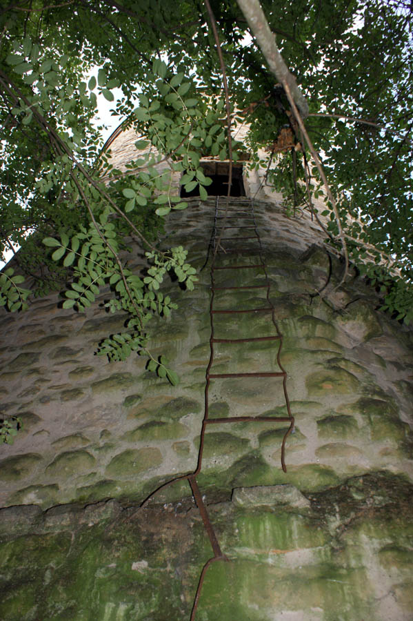 Agank an den Tuerm vun der Abtei Almënster.